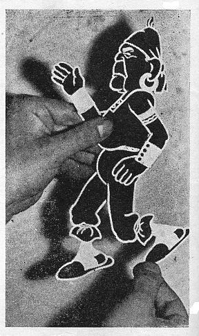 Cirino Cristiani muestra una figura recortada y articulada como las que inventó en 1916 para sus filmes de animación pioneros